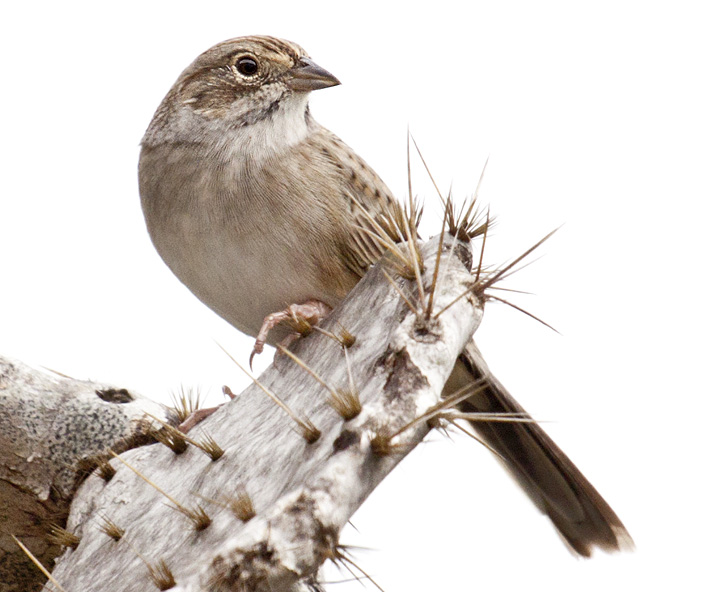 Loma Alta, Cameron Co., TX, USA.